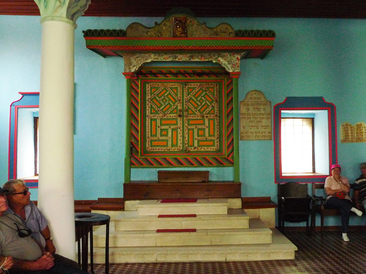 The Synagogue in Veria-the Torah ark